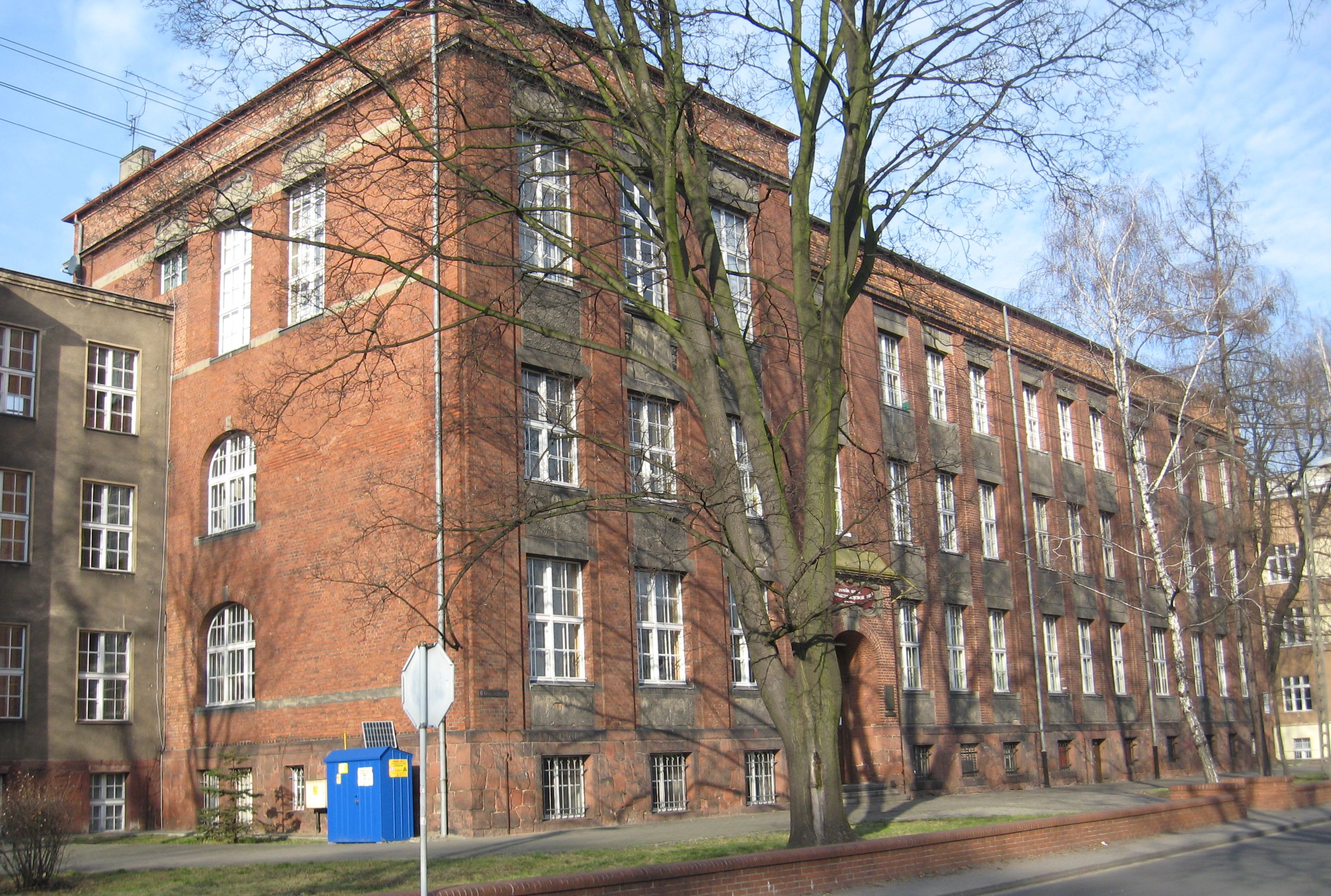 Leszno, ul. Kurpińskiego 1 - Zespół szkół ogólnokształcących Nr. 1